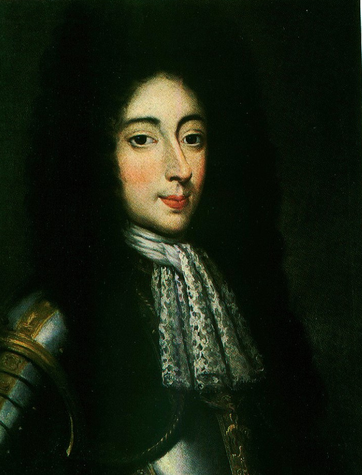 Ritratto dell' ultimo Duca di Mirandola Francesco Maria II Pico